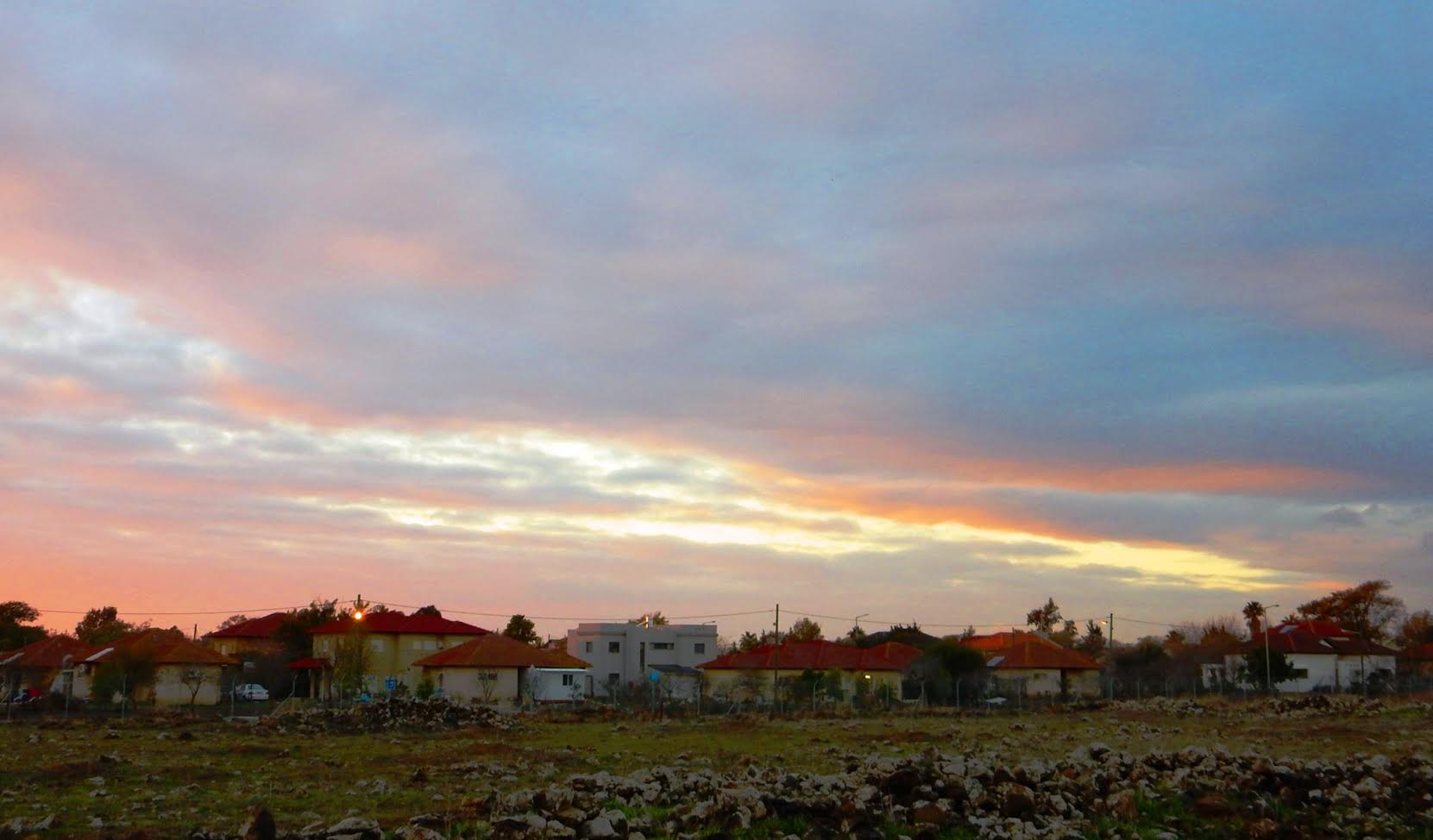 שקיעה בחיספין